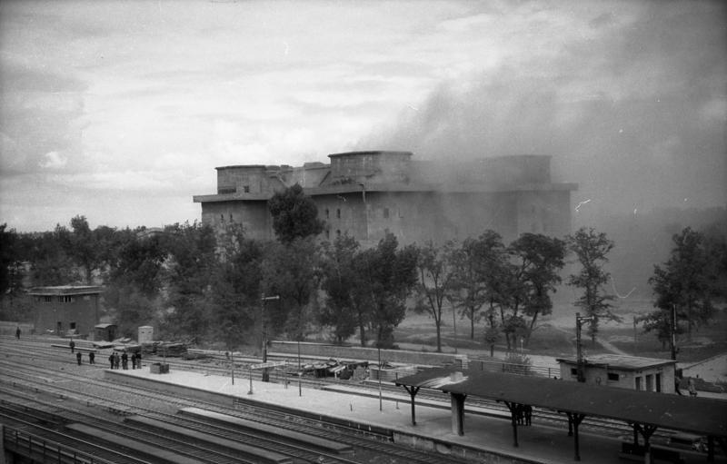 Berlin, Sprengung des Zoobunkers ADN-ZB, Heilig, Berlin, 1947, Der Zoobunker wird gesprengt. 817-47, 4.9.1947